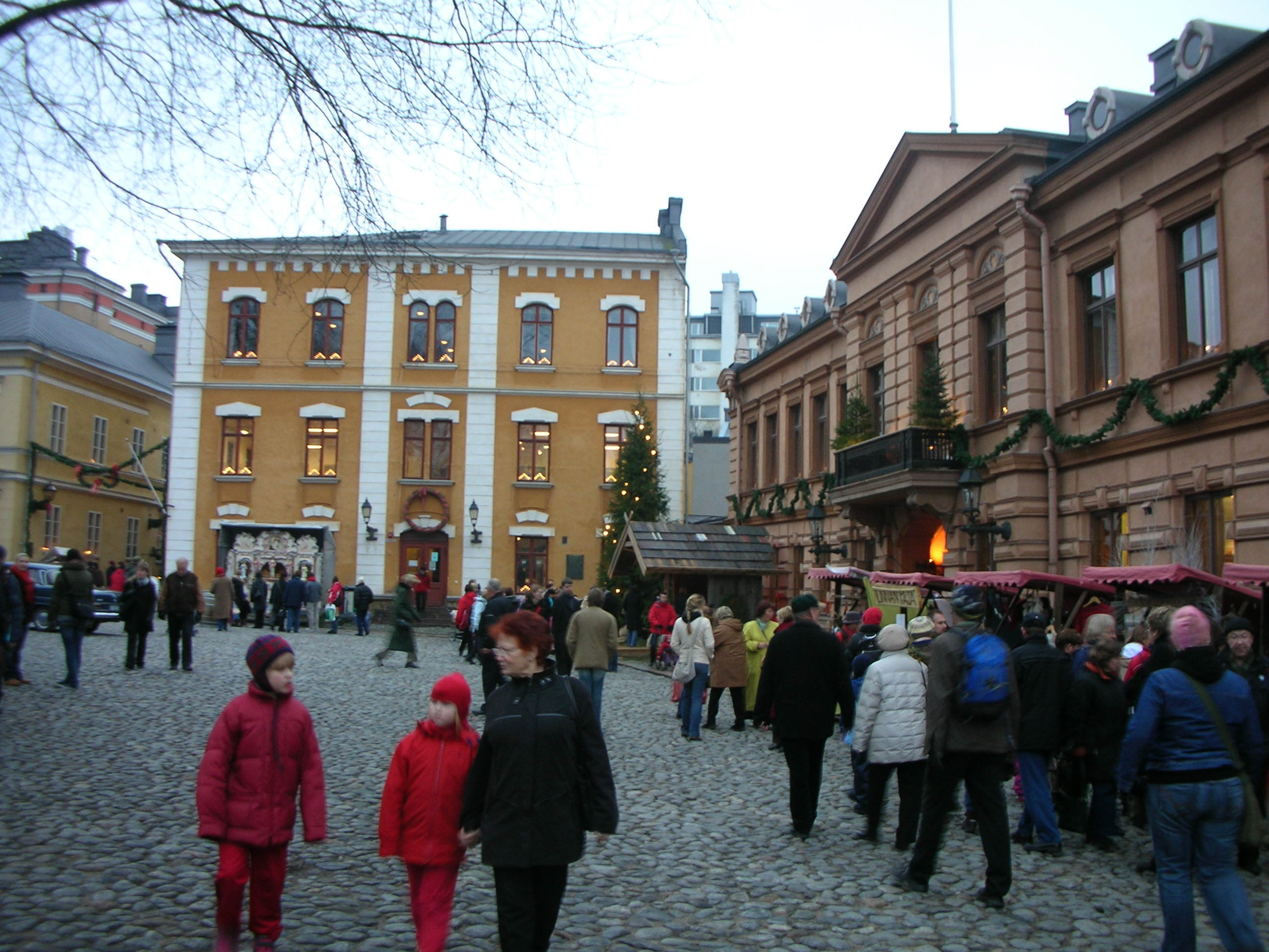 Brinkkala ja vanha raatihuone